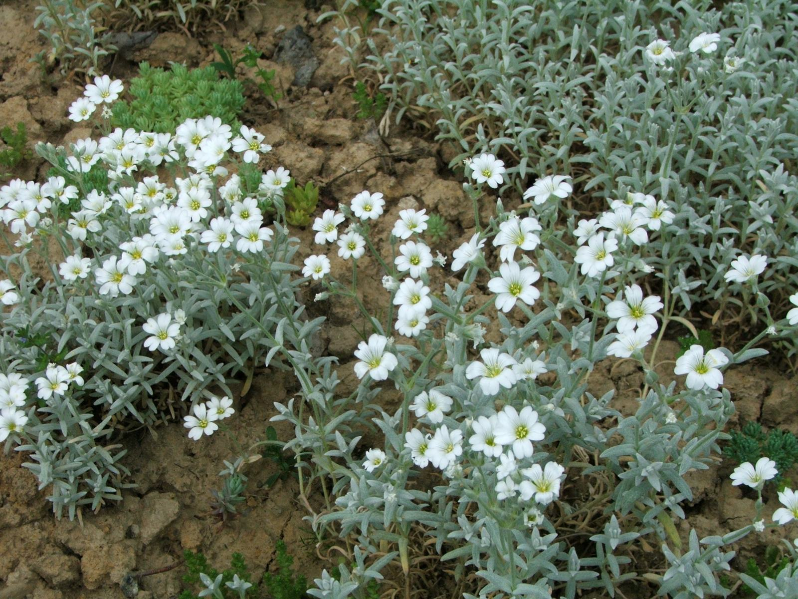 Cerastium tomentosum var columnae (pl. rogownica kutnerowata)